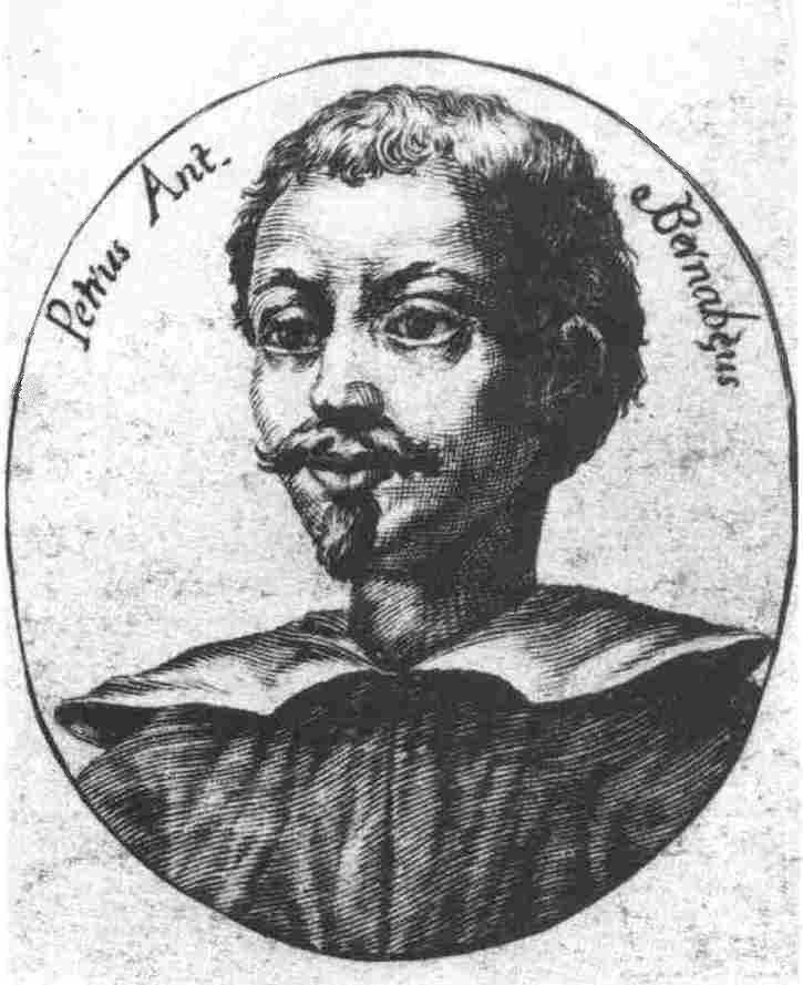 Pier Antonio Bernabei (1567-1630), painter Parma